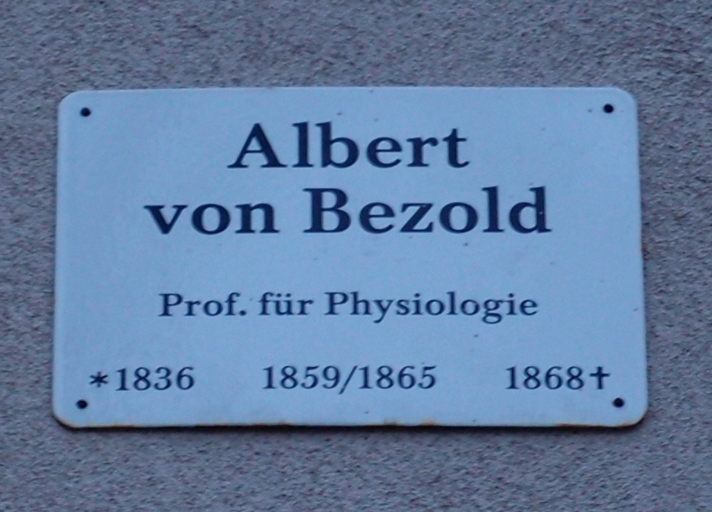 Gedenktafel für den deutschen Physiologen Albert von Bezold (* 7. Januar 1836 in Ansbach; † 2. März 1868 in Würzburg) in Jena, Teichgraben 7.